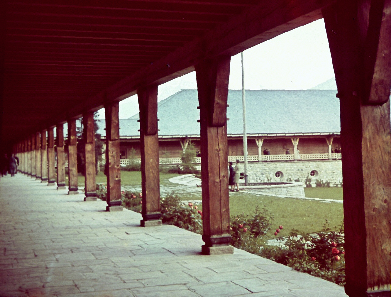 Sonthofen, Ordensburg, Arkaden unter dem Ostflügel, gegen Süden photographiert, 1939